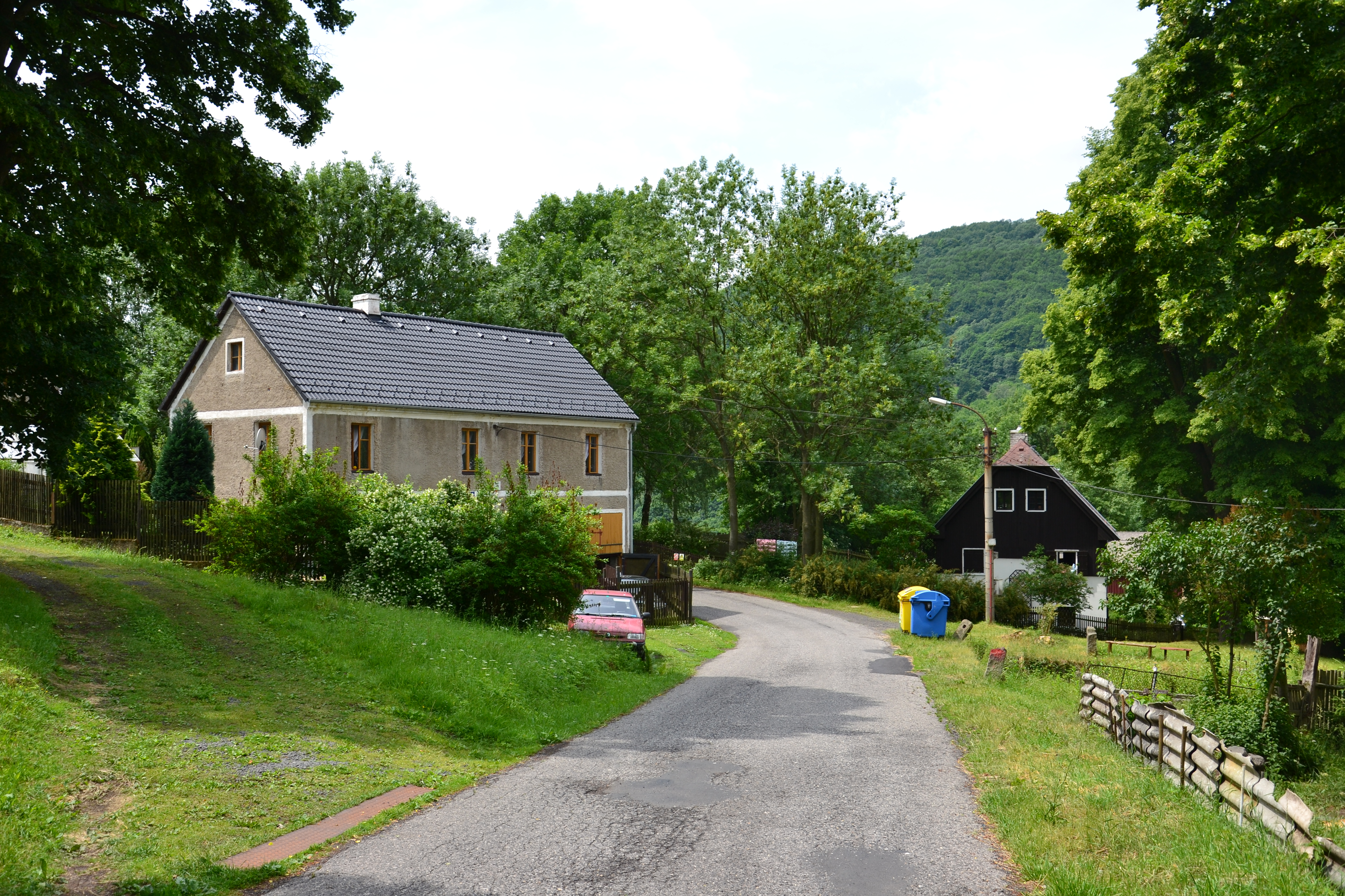 Osada Kamenec